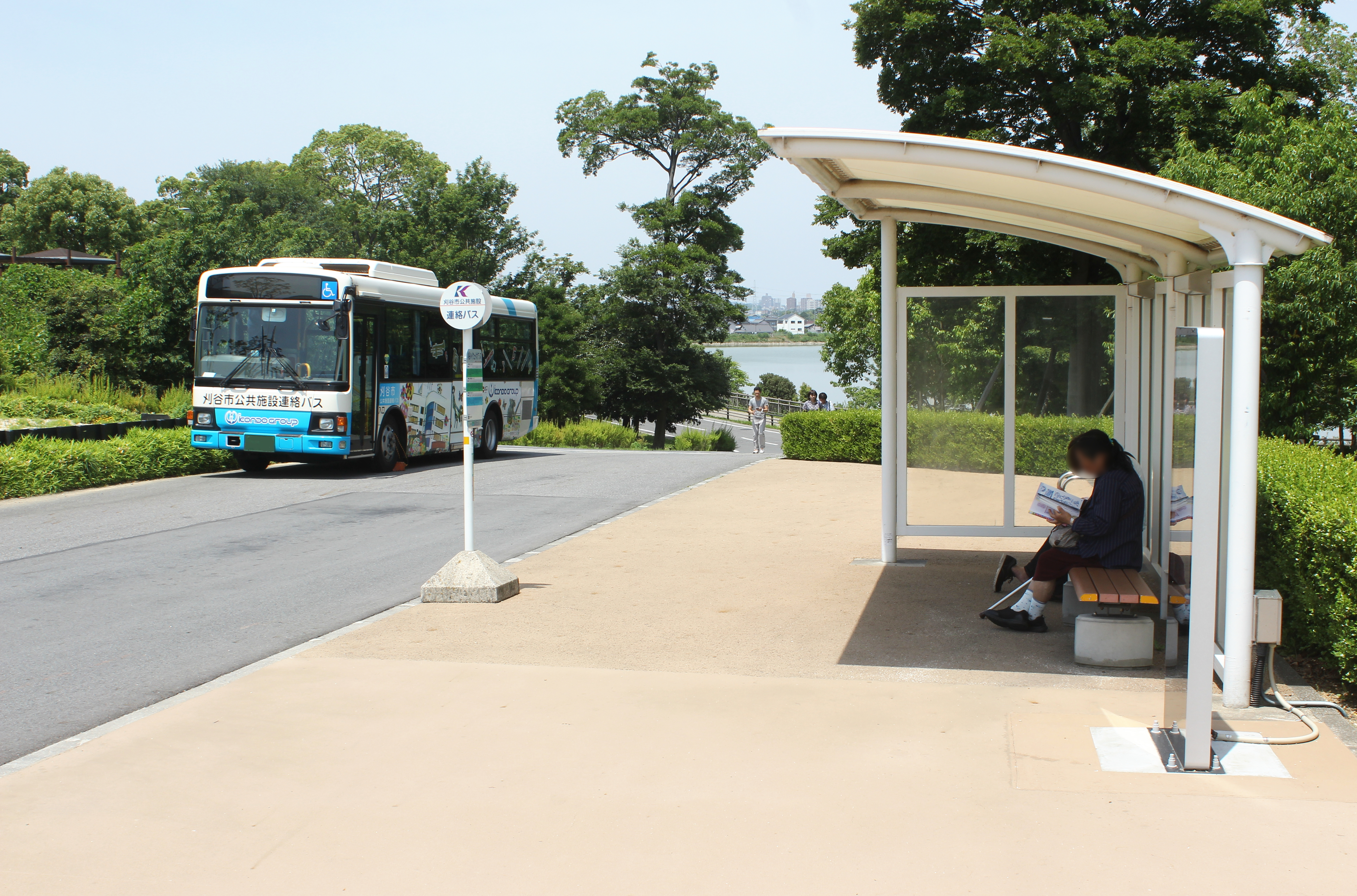 刈谷PAの連絡バスとバス停